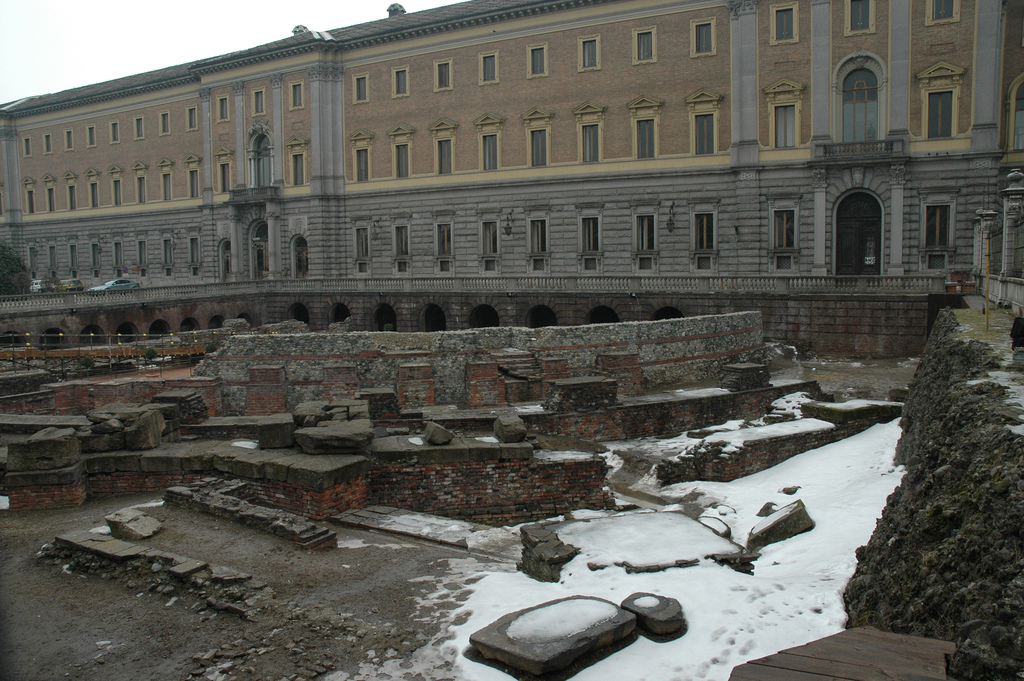 Il teatro romano accanto al Palazzo Reale a Torino, Italia.Teatro romano